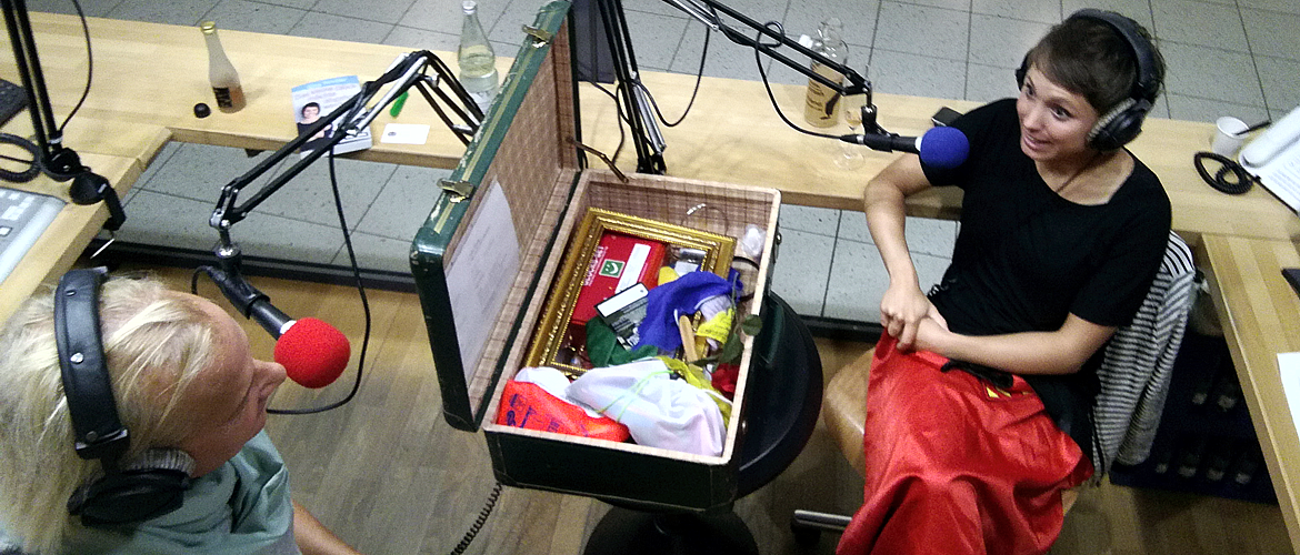 Glücksministerin Gina Schöler in Folge 4 von Talk mit DanaDepicted people: Dana Diezemann and Ministry of Happiness and Wellbeing